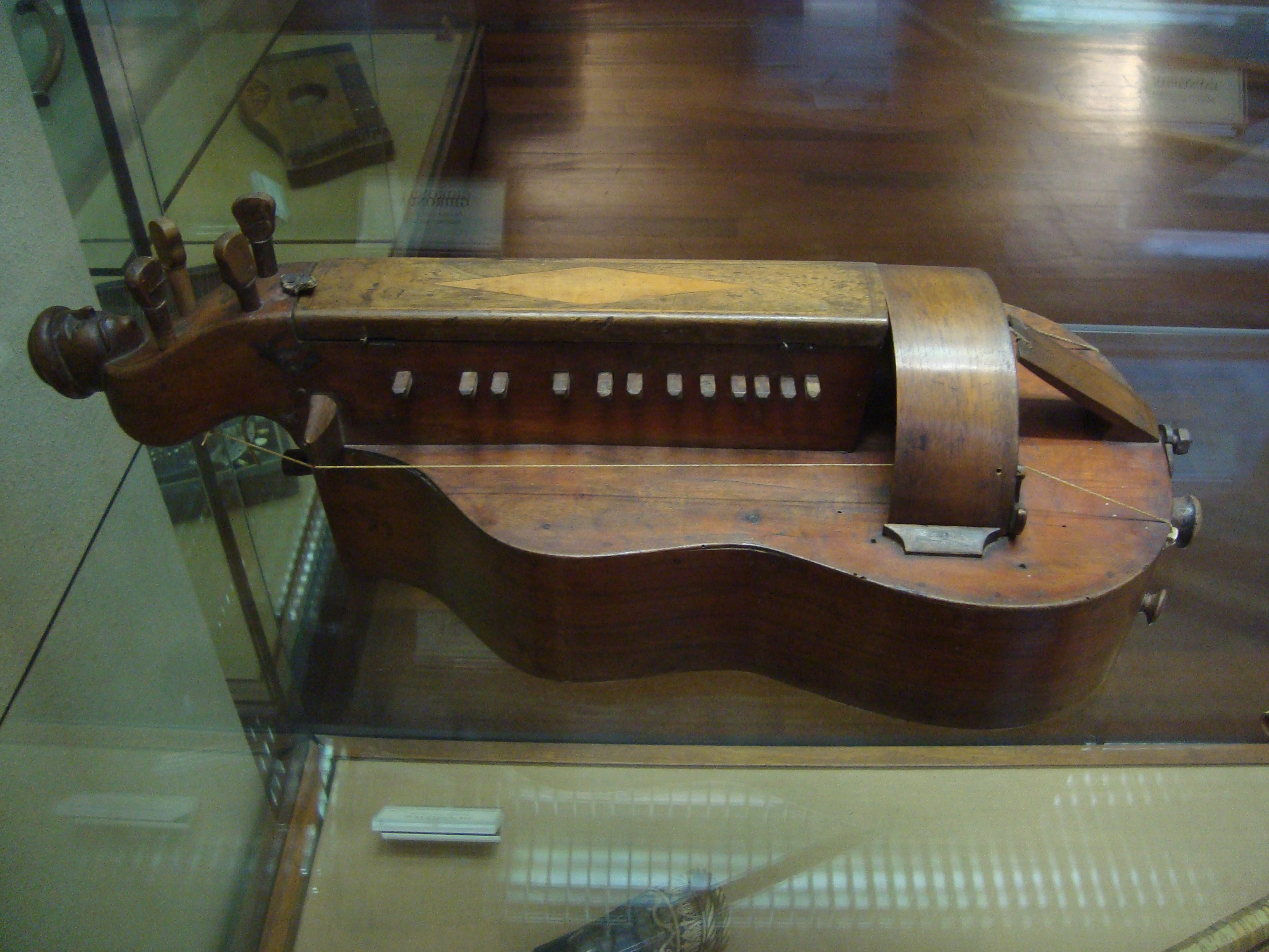 Vielle à roue du XVIIe siècle, Museo Nazionale degli Strumenti Musicali di Roma